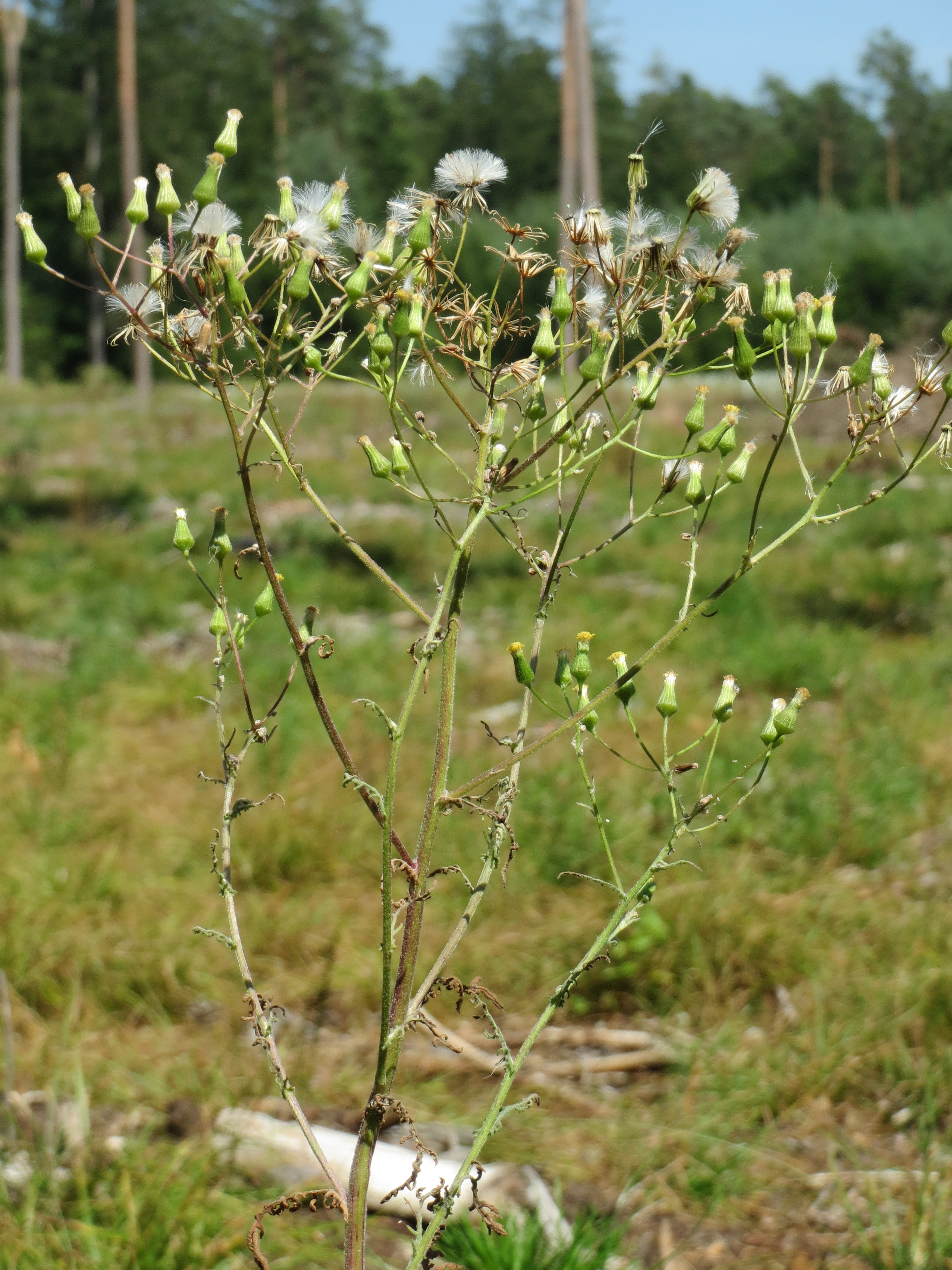 Wald-Greiskraut (Senecio sylvaticus) im Schwetzinger Hardt